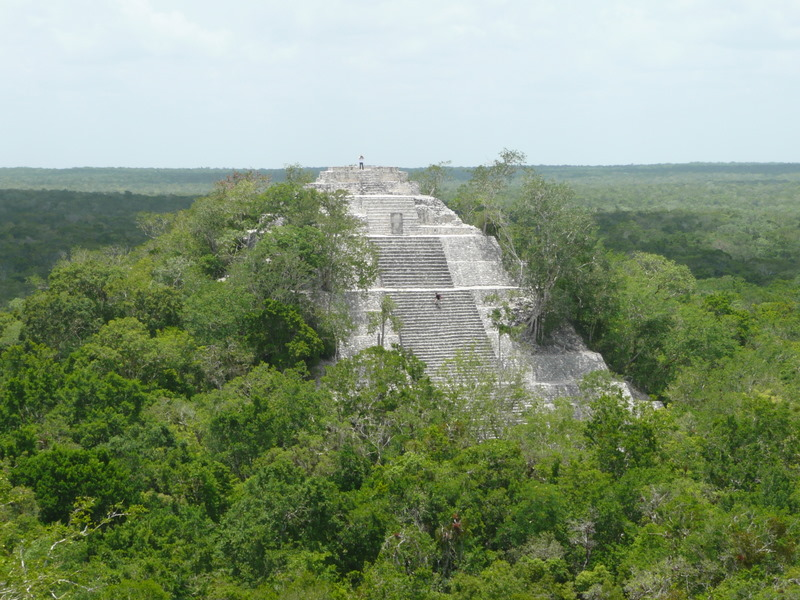 Zona Arqueológica Maya de Calakmul